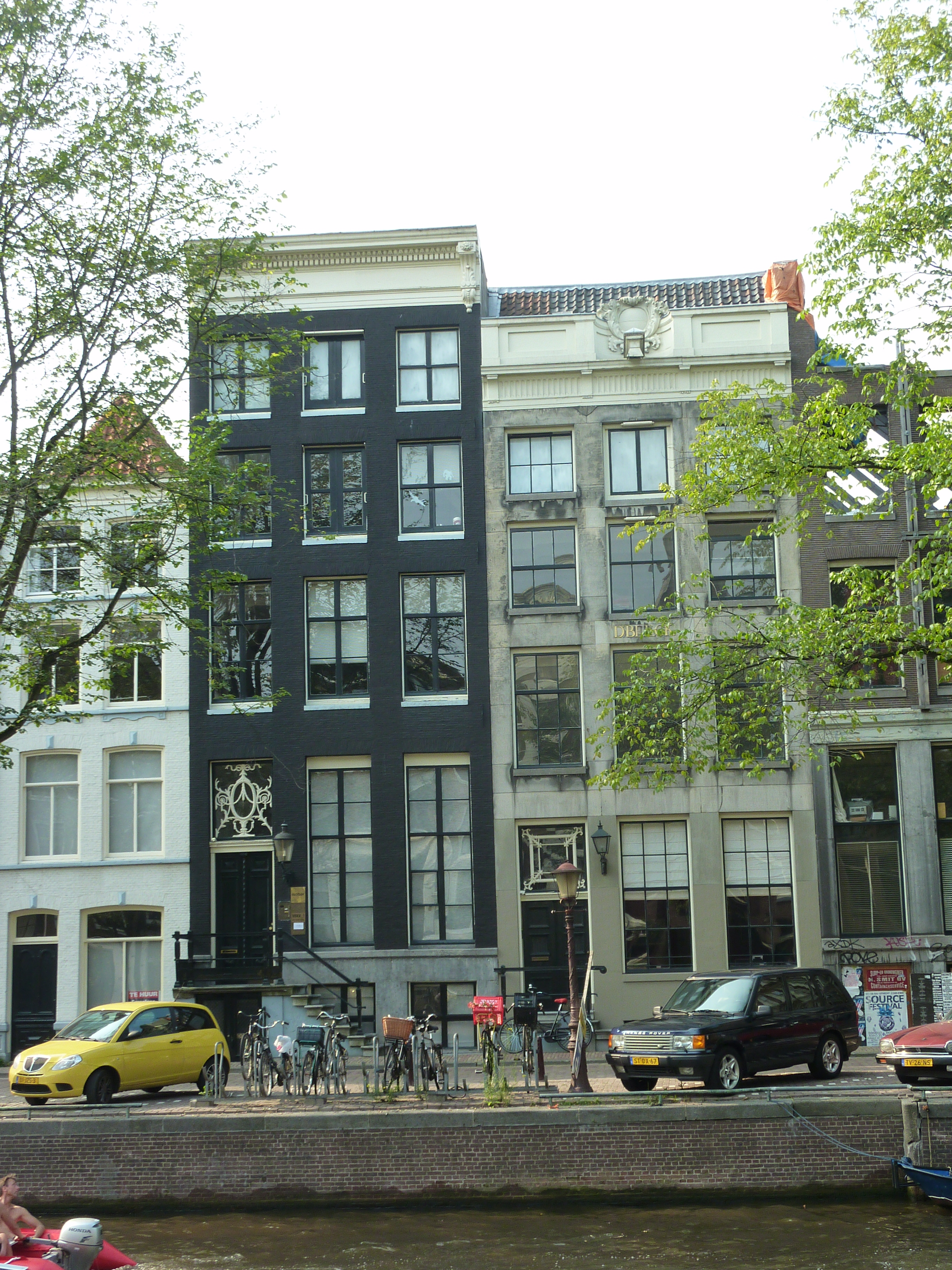 Amsterdam, Herengracht 136-134. In dem Gebäude Herengracht 134 führt nach den Ersten Weltkrieg Friedrich ("Fritz") Bernard Gutmann (* 15.11.1886 Berlin bis † 01.05.1944 ermordet Theresienstadt) die Bank Proehl & Gutmann, eine Tochterbank der Dresdner Bank AG. 1933 kündigte die Dresdner Bank den Vertrag mit dem Bankhaus in Holland. Fritz Gutmann ging pleite. Er war der jüngst Sohn des Gründers der Dresdner Bank AG Eugen Gutmann (* 24.6.1840 Dresden, † 21.8.1925 München), selbst Sammler und Sachwalter der Kunstsammlung seines Vaters Eugen. Fritz und seine Ehefrau Louise Baronin von Landau (* 24.04.1892 Berlin † 07.1944 Auschwitz) lebten seit 1919 im Huize Bosbeek in Heemstede, Niederlande. 1944 wurden das Ehepaar ermordet und die Sammlung geraubt. Das Kaufmannshaus in der Herengracht 134 wurde um 1750 für die Familie Van Beeck gebaut. Es hat eine Hausbreite von 6,50 m, eine flache Fassade mit einem geraden Gesims und vier Konsolen zwischen Leuchten, eine Balustrade mit einer Traverse in einem Bilderrahmen, einem Bürgersteig und einer Tür mit sechs Tafeln.